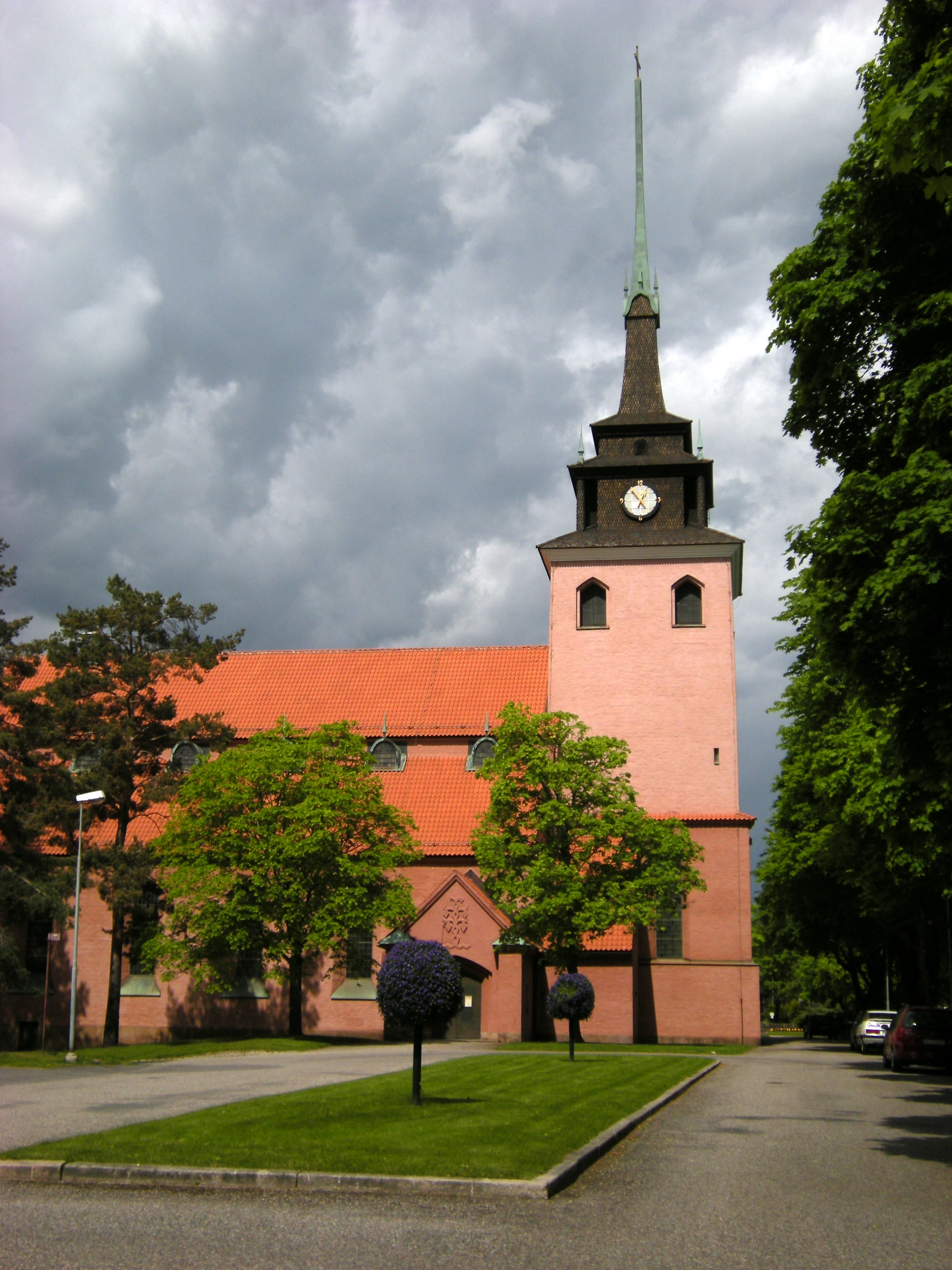 Sandvikens kyrka. Bergslagssafari 2010.